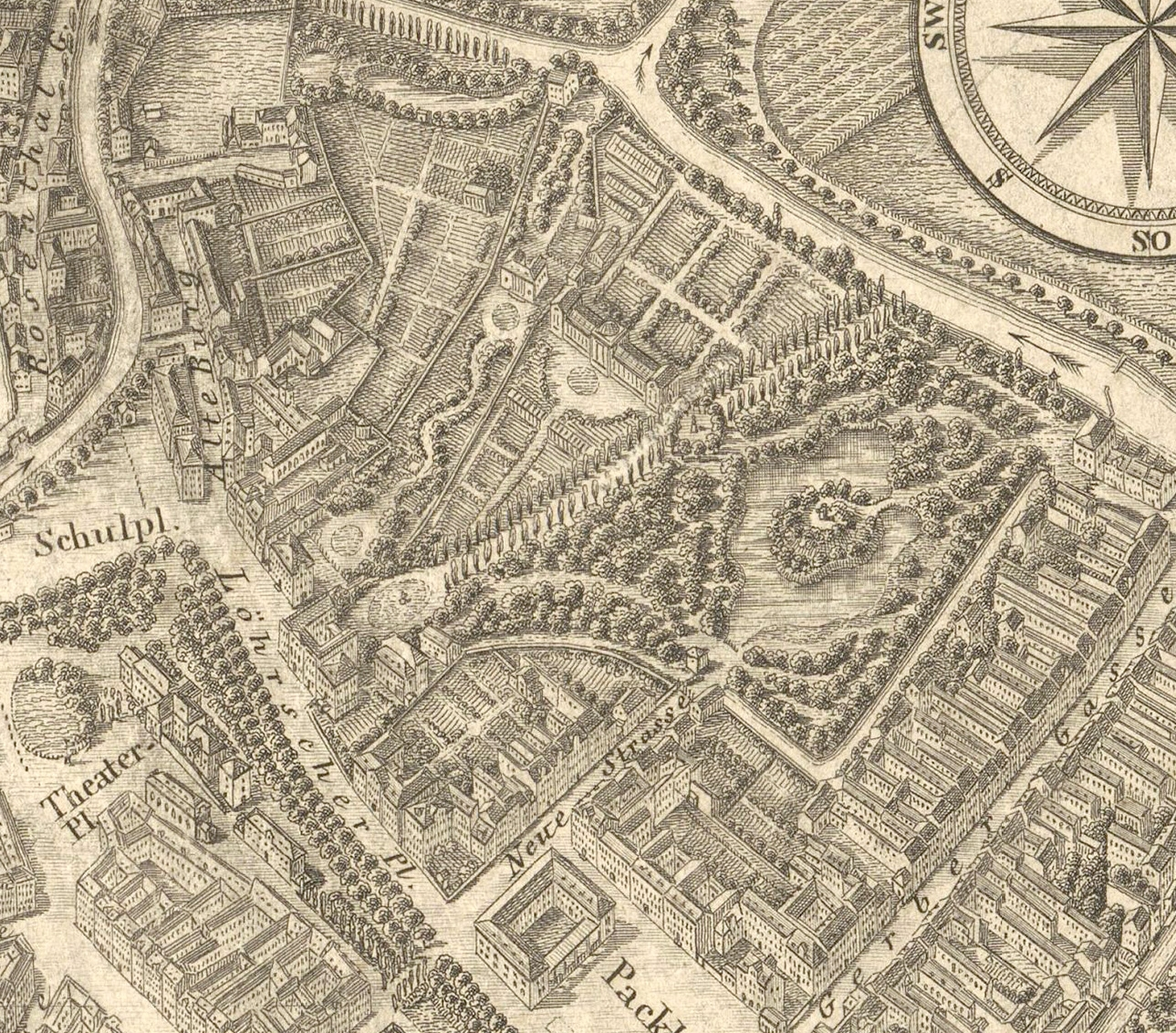 Ausschnitt aus dem Vogelschauplan von Leipzig von 1847 mit der Gegend um Löhrs Garten (zwischen Löhrscher Platz und Parthe-Fluss)